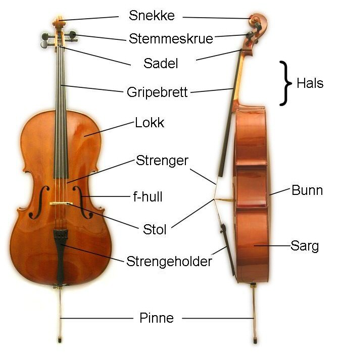 En cello